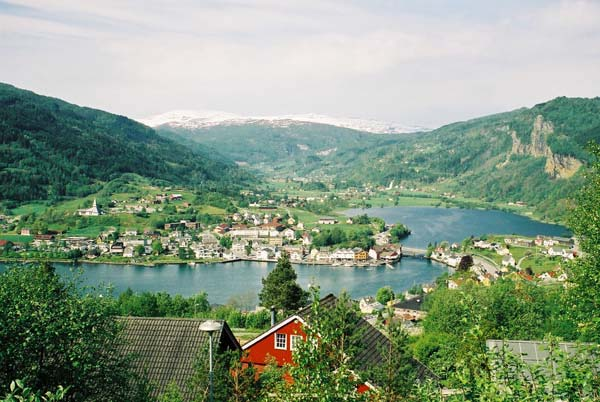 Norheimsund sett frå Tolomarka. I bakkant av Movatnet kan ein skimta Steinsdalsfossen.